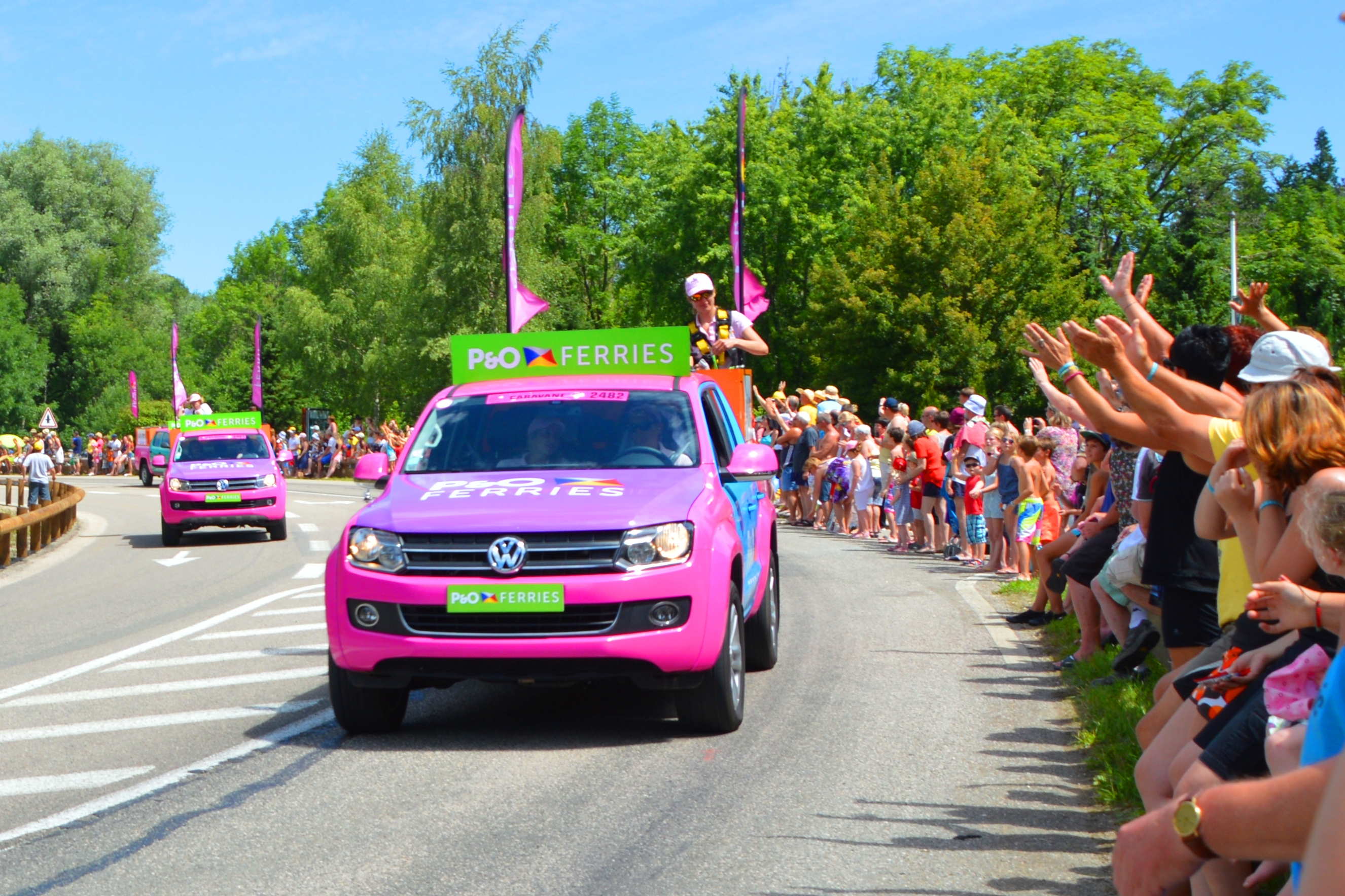 Publicité de la Caravane du Tour de France pour P&O Ferries. Photo prise sur la D27 près du Lac de Chalain (Jura) pendant l' Etape 11 du Tour de France 2014.